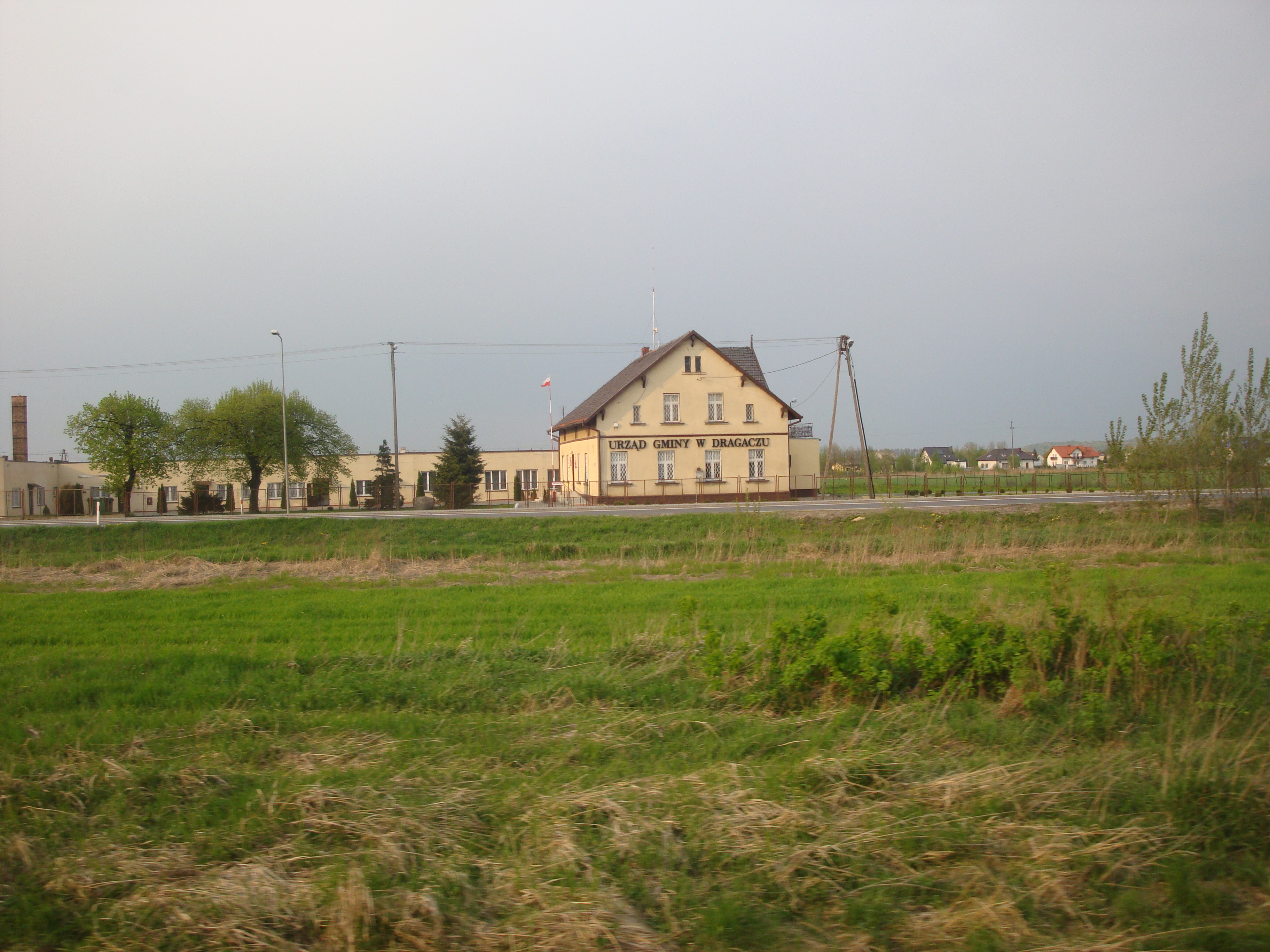 Urząd Gminy w Dragaczu (kujawsko-pomorskie